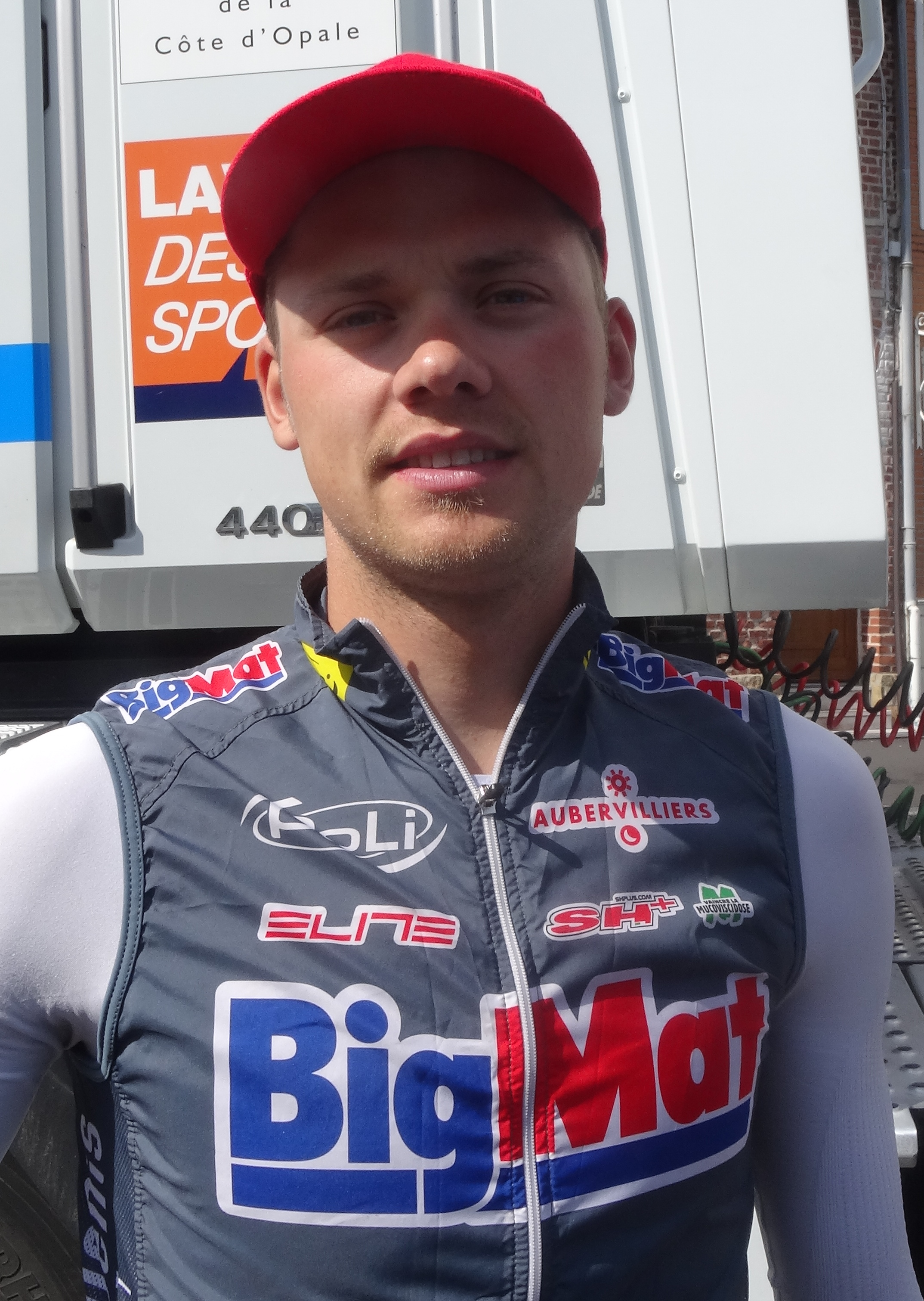 Reportage photographique réalisé le vendredi 23 mai 2014 à l'occasion du départ de la première étape du Paris-Arras Tour 2014 à Lens, Pas-de-Calais, Nord-Pas-de-Calais, France. Depicted person: Alo Jakin